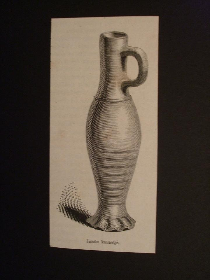 Gravure uit 1869